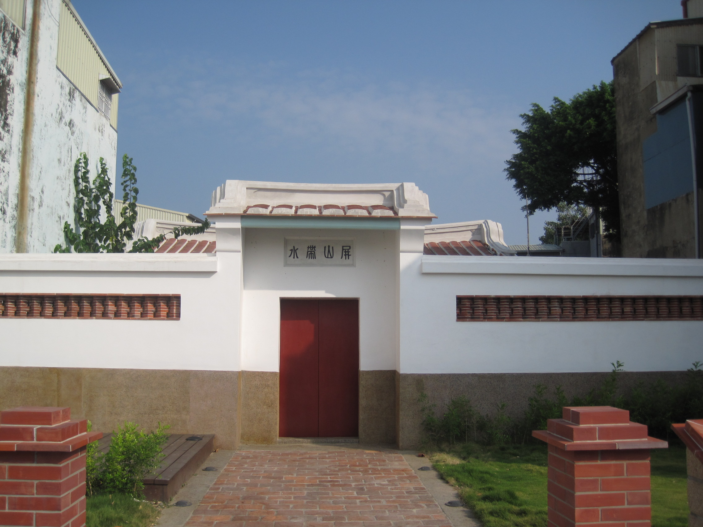 經過整修後的盧經堂厝